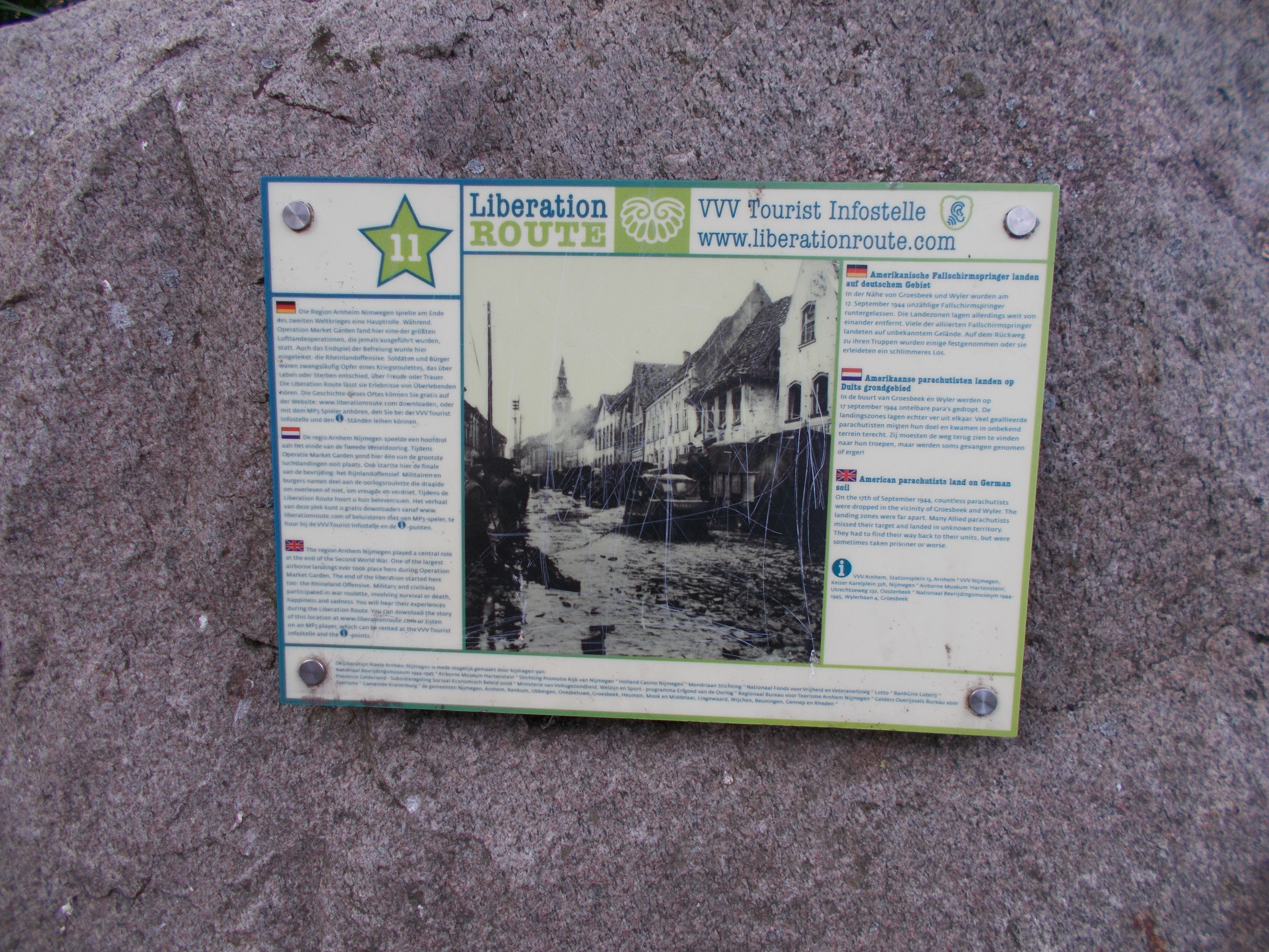 Infotafel auf einem Friedendsstein der Liberation Route Europe vor dem Rathaus Kranenburg.